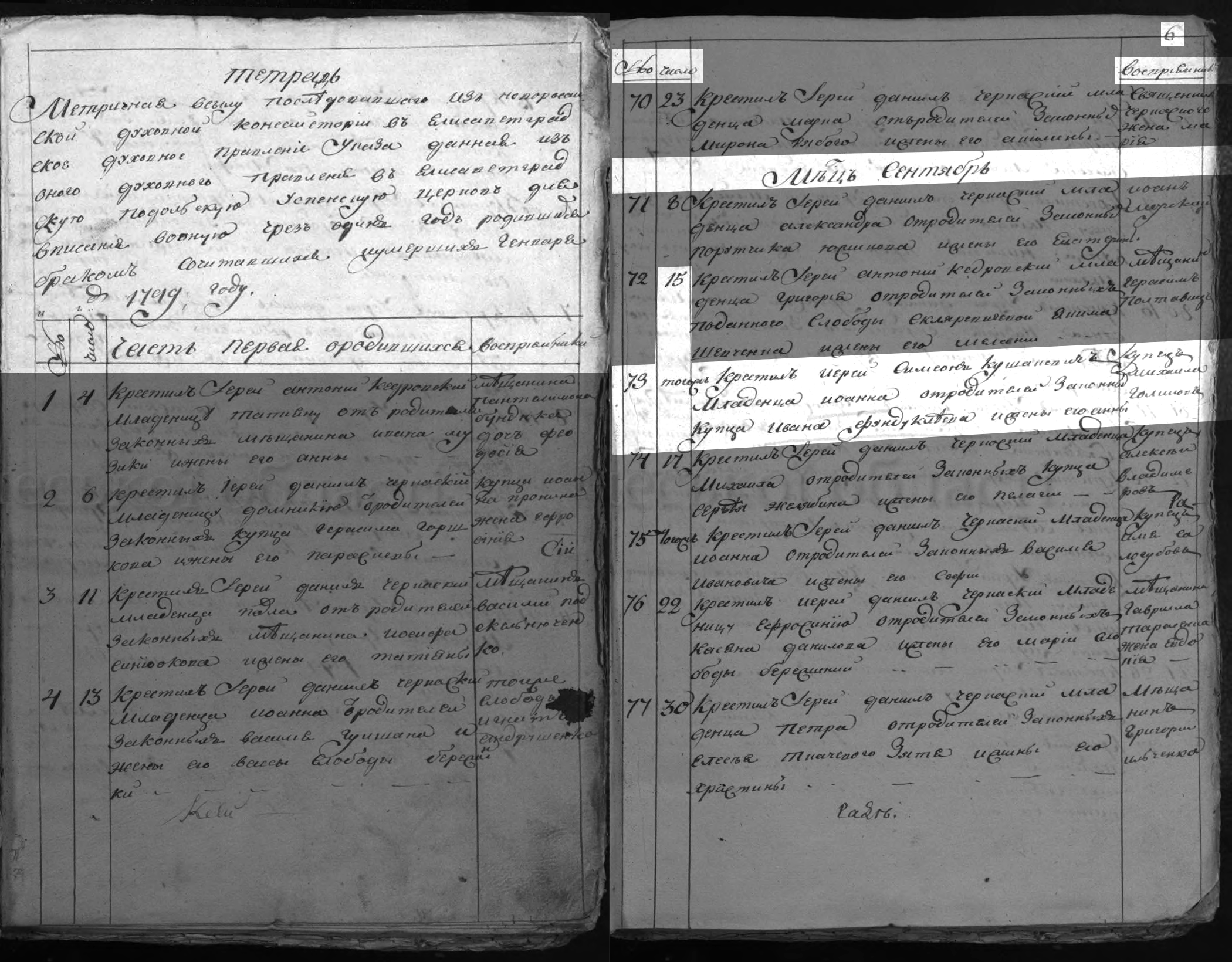 Запис про народження та хрещення Івана Фундуклея (1799—1880)